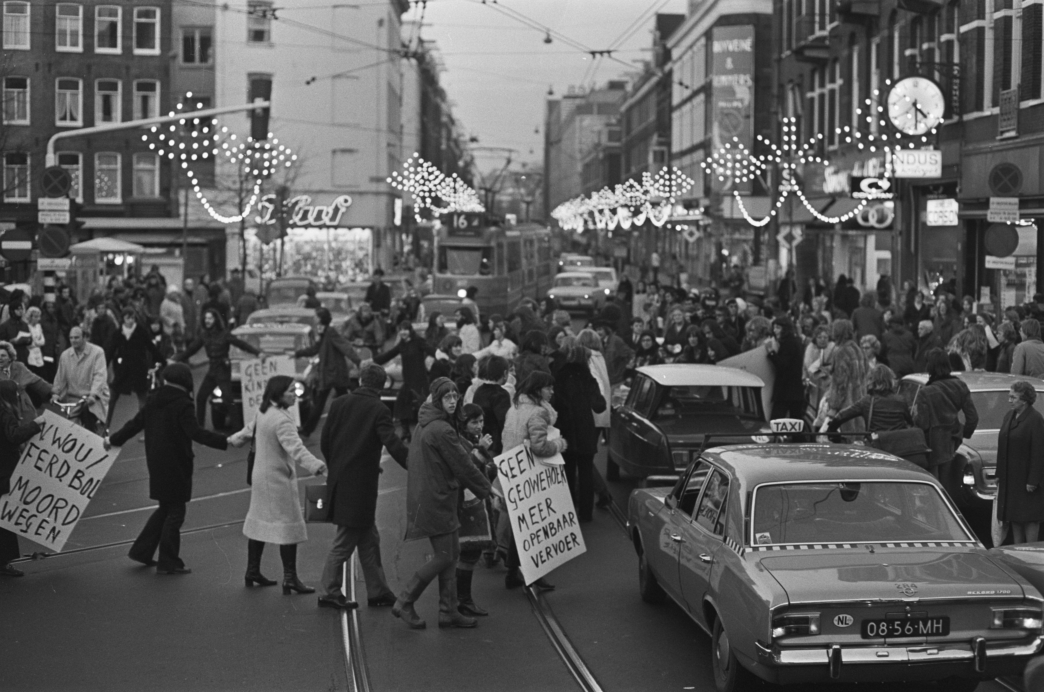 Collectie / Archief : Fotocollectie Anefo Reportage / Serie : [ onbekend ] Beschrijving : Aktiegroep Stop kindermoord bezet kruispunt bij Albert Cuypstraat te Amsterdam Datum : 15 december 1972 Locatie : Amsterdam, Noord-Holland Trefwoorden : aktiegroepen, bezettingen Instellingsnaam : Pressiegroep Stop de Kindermoord Fotograaf : Mieremet, Rob / Anefo Auteursrechthebbende : Nationaal Archief Materiaalsoort : Negatief (zwart/wit) Nummer archiefinventaris : bekijk toegang 2.24.01.05 Bestanddeelnummer : 926-1050